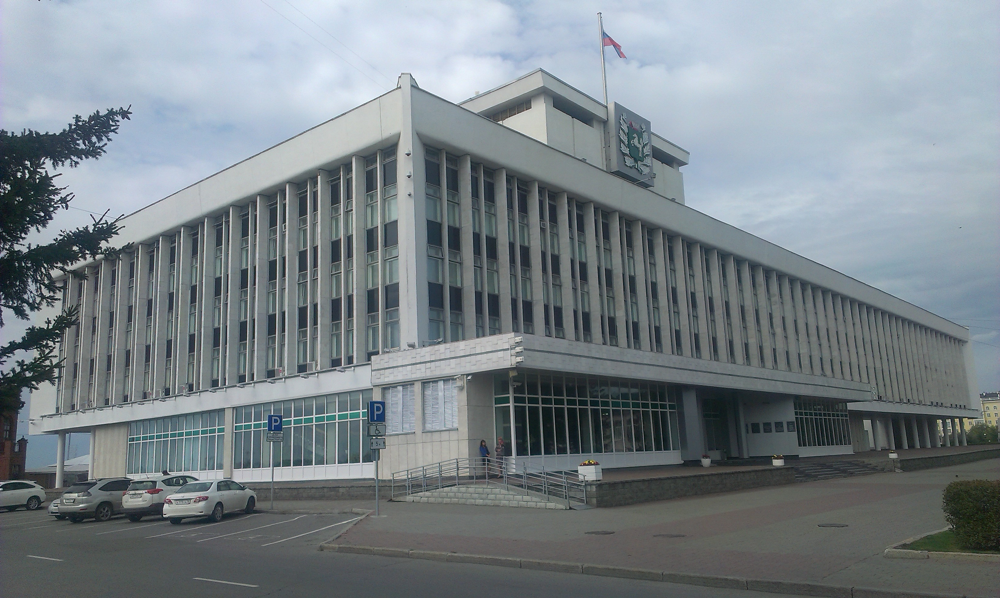 Администрация Томской области